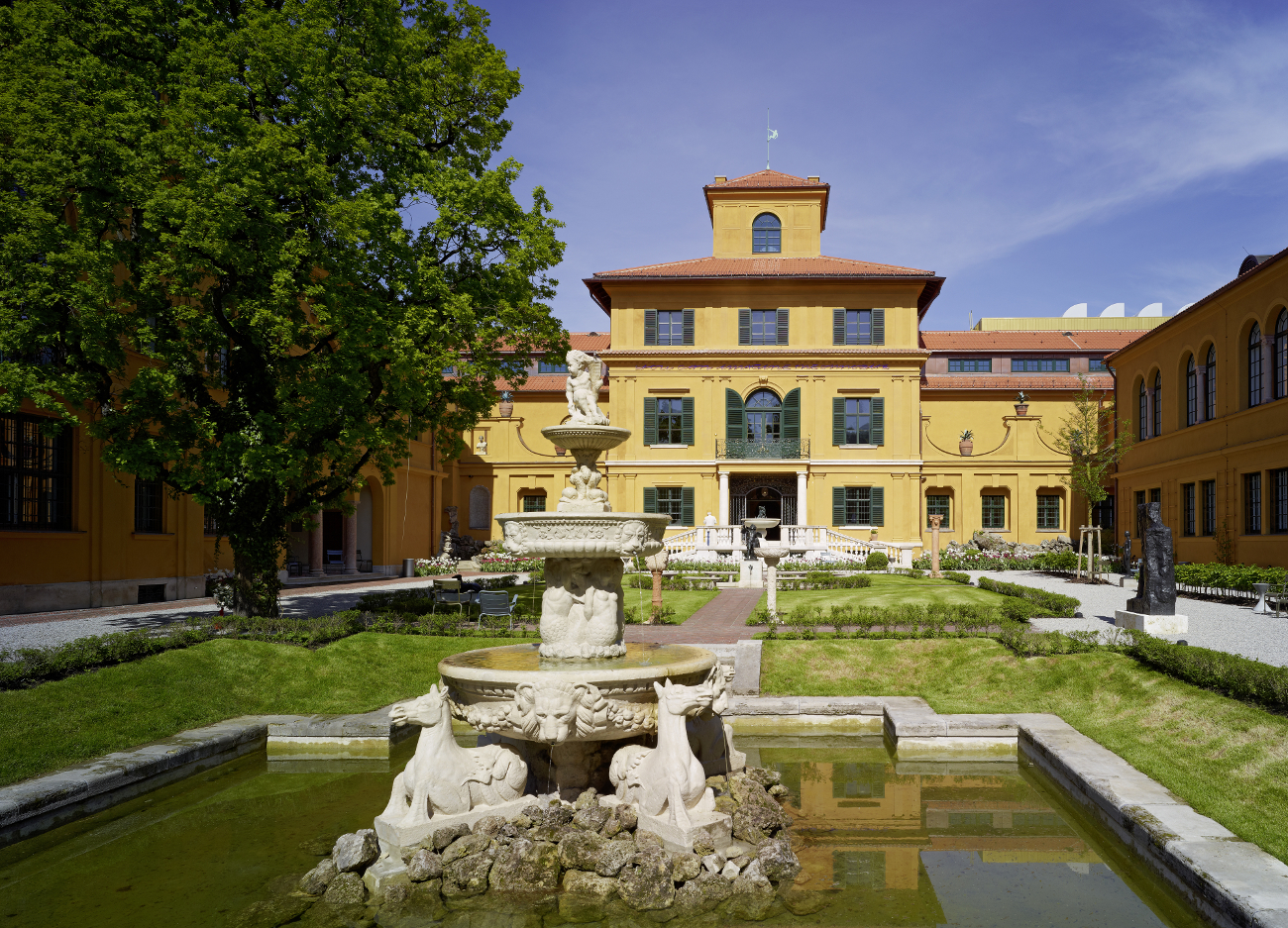 Gartenansicht © Städtische Galerie im Lenbachhaus und Kunstbau, München